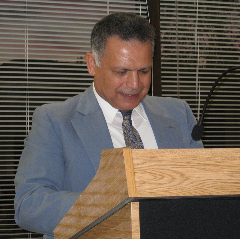 علیرضا شاپور شهبازی با سپاس از جناب هرمز امامی که اجازهٔ نشر این اثر را دادند.